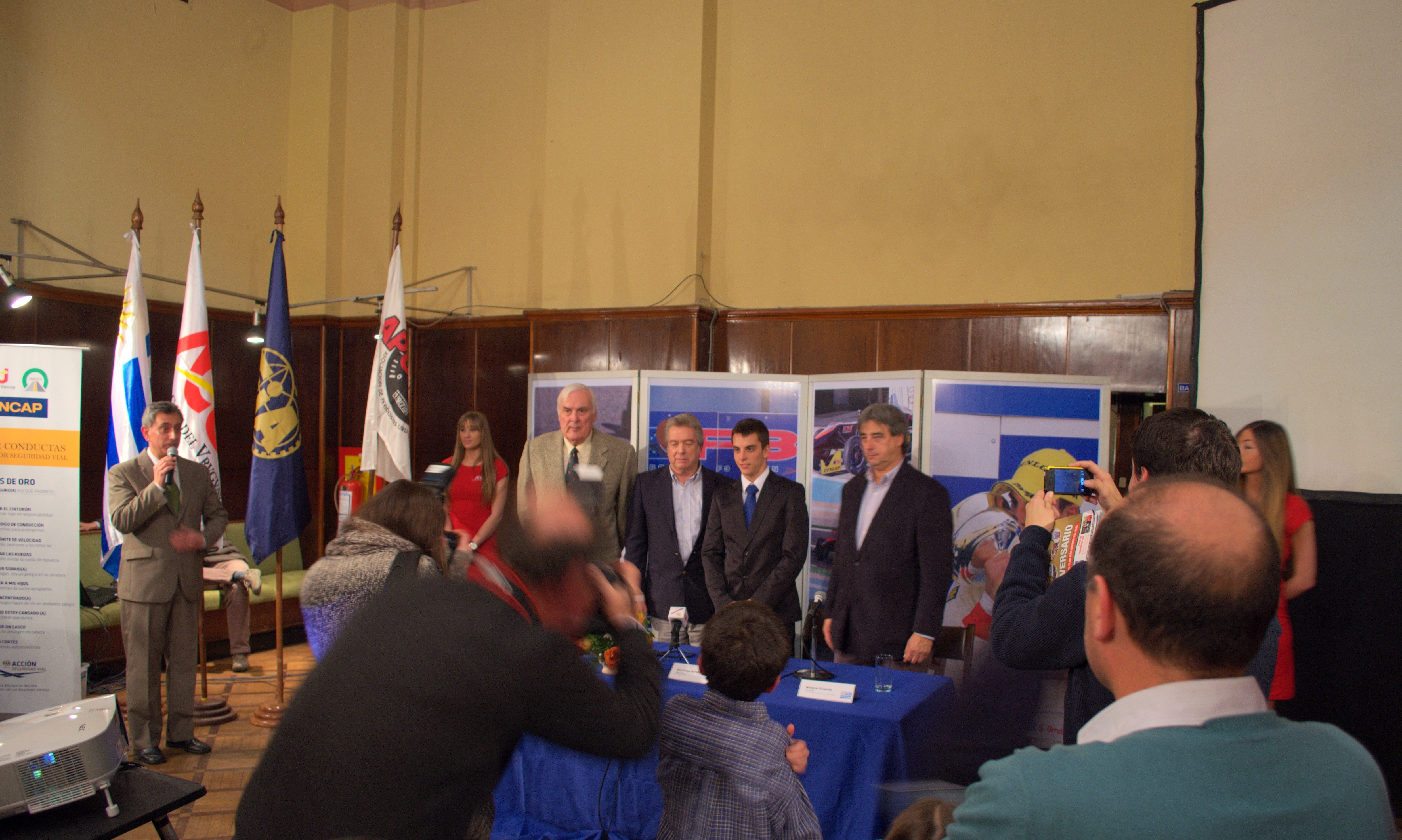 Solo se permite el uso de esta imagen mencionando a Velocidad Total como su autor. Imagen de una conferencia de prensa de Santiago Urrutia, realizada en 2013.